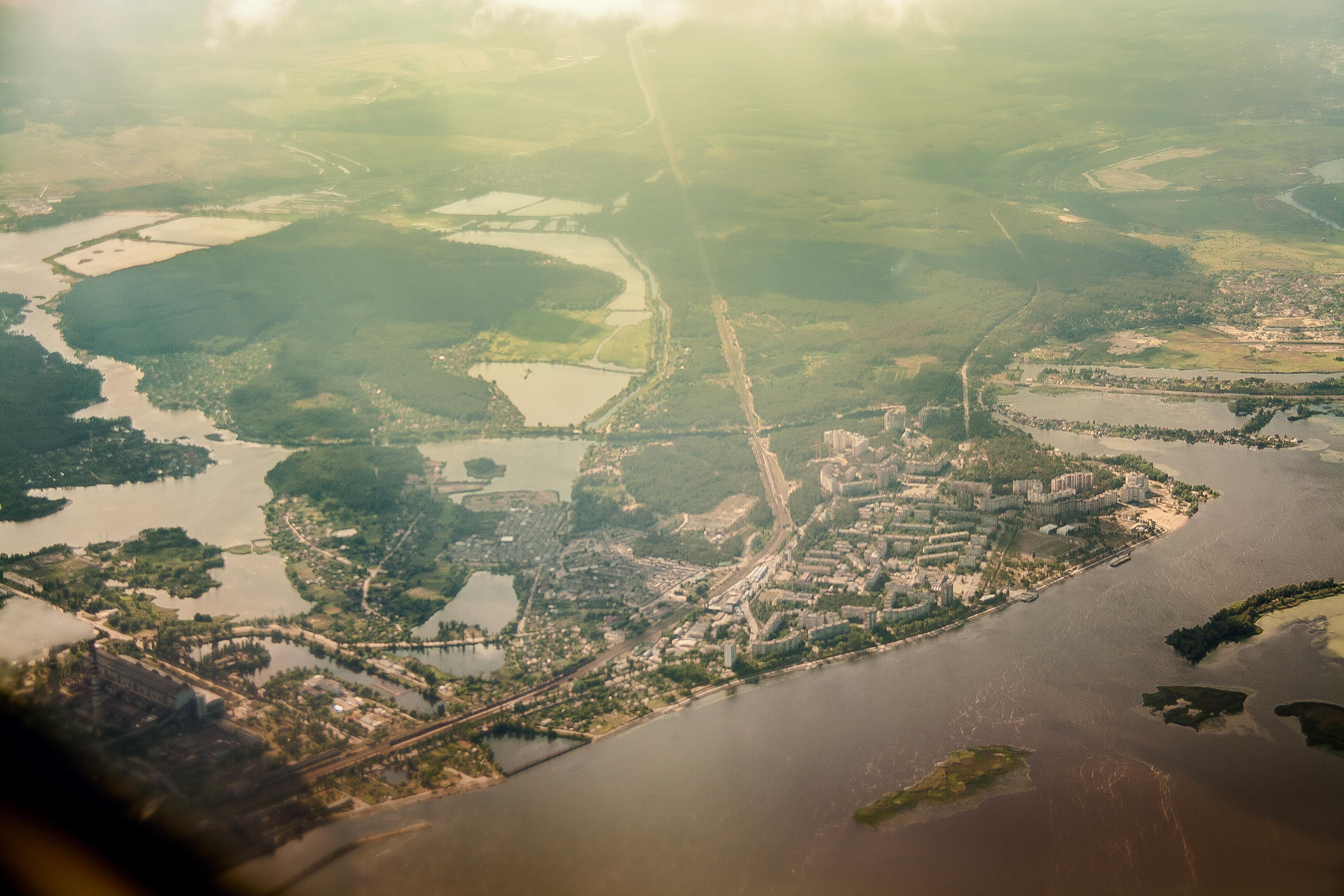 En realidad son urbanizaciones en las afueras de la ciudad, ibamos rumbo al aeropuerto de Boryspil. Kiev, Ucrania.